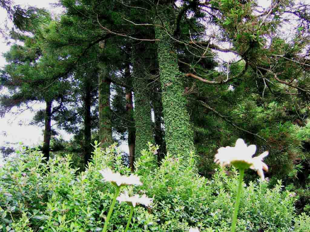 Vegetação do Parque Florestal das Sete Fontes, ilha de São Jorge, Açores, Portugal